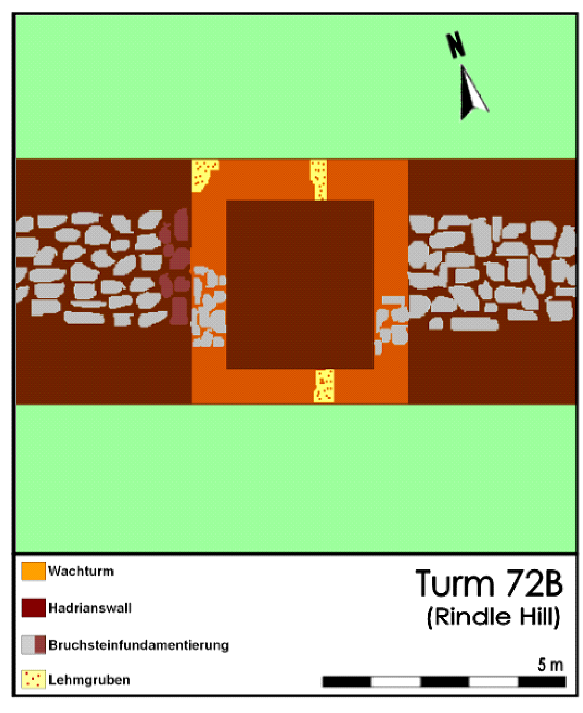 Befundskizze Wachturm 72B (Rindle Hill), 2. Jahrhundert n.Chr., Hadrianswall/Holz-Erde-Version (GB)